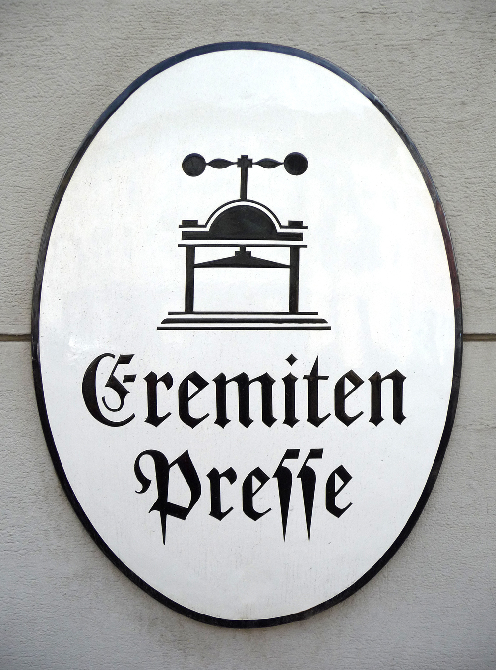 Logo Eremitenpresse, Fortunastraße 11 in 40235 Düsseldorf